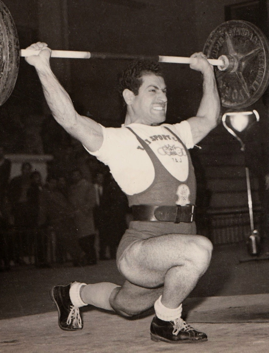 Henrik Tamraz